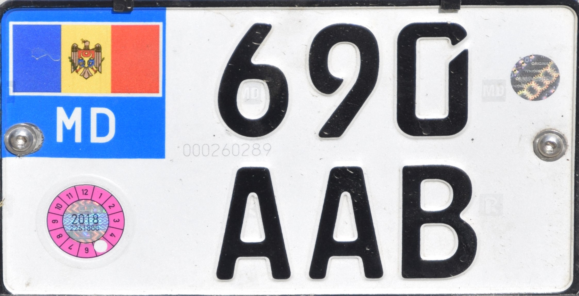 Moldavië motorfiets kentekenplaat